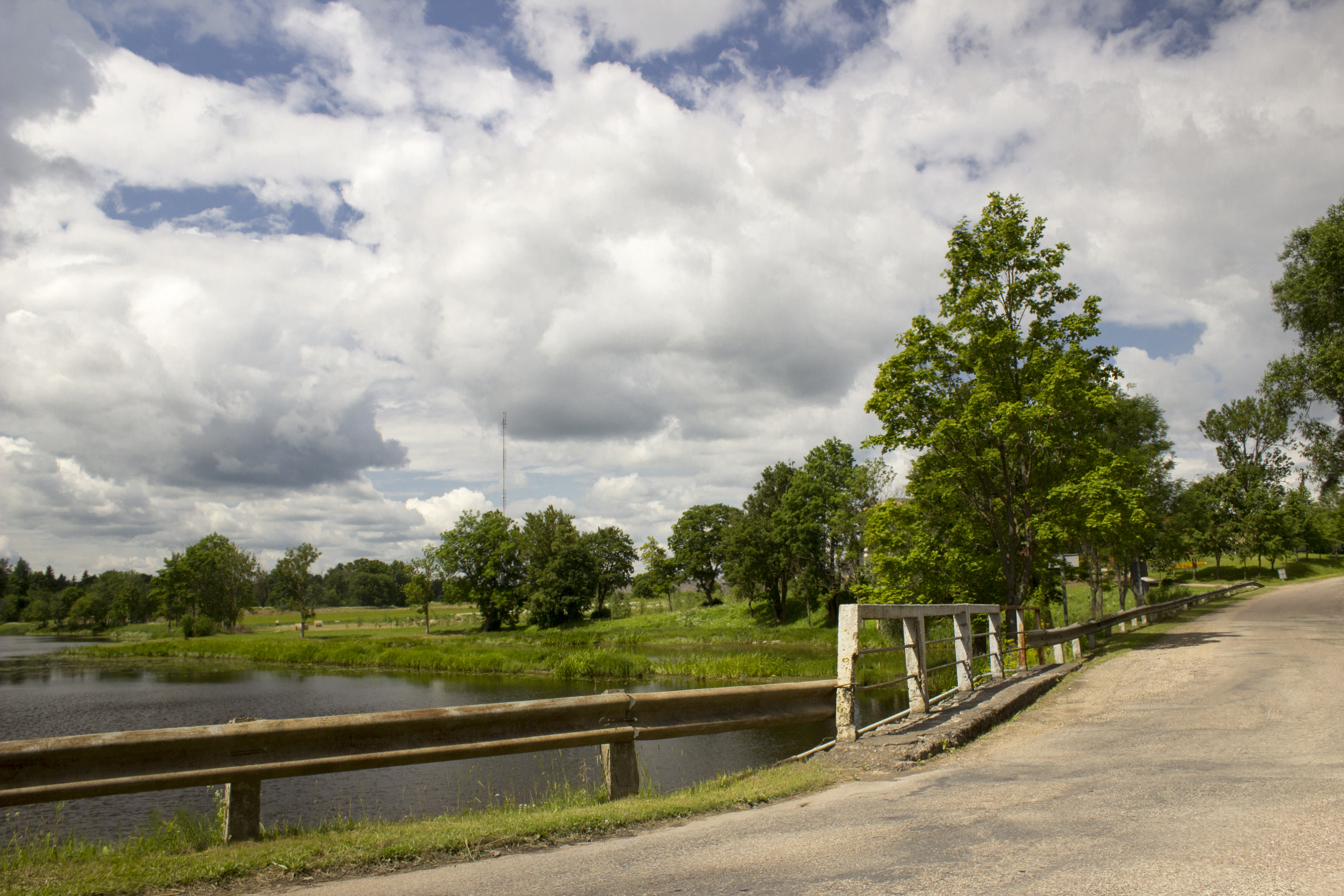 Viesatas dzirnavu dīķis / mill pond